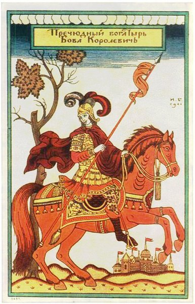 Пречудный богатырь Бова Королевич. 1911.Открытка издания "Общины св. Евгении". №5497. Из коллекции Э.Б. Файнштейна